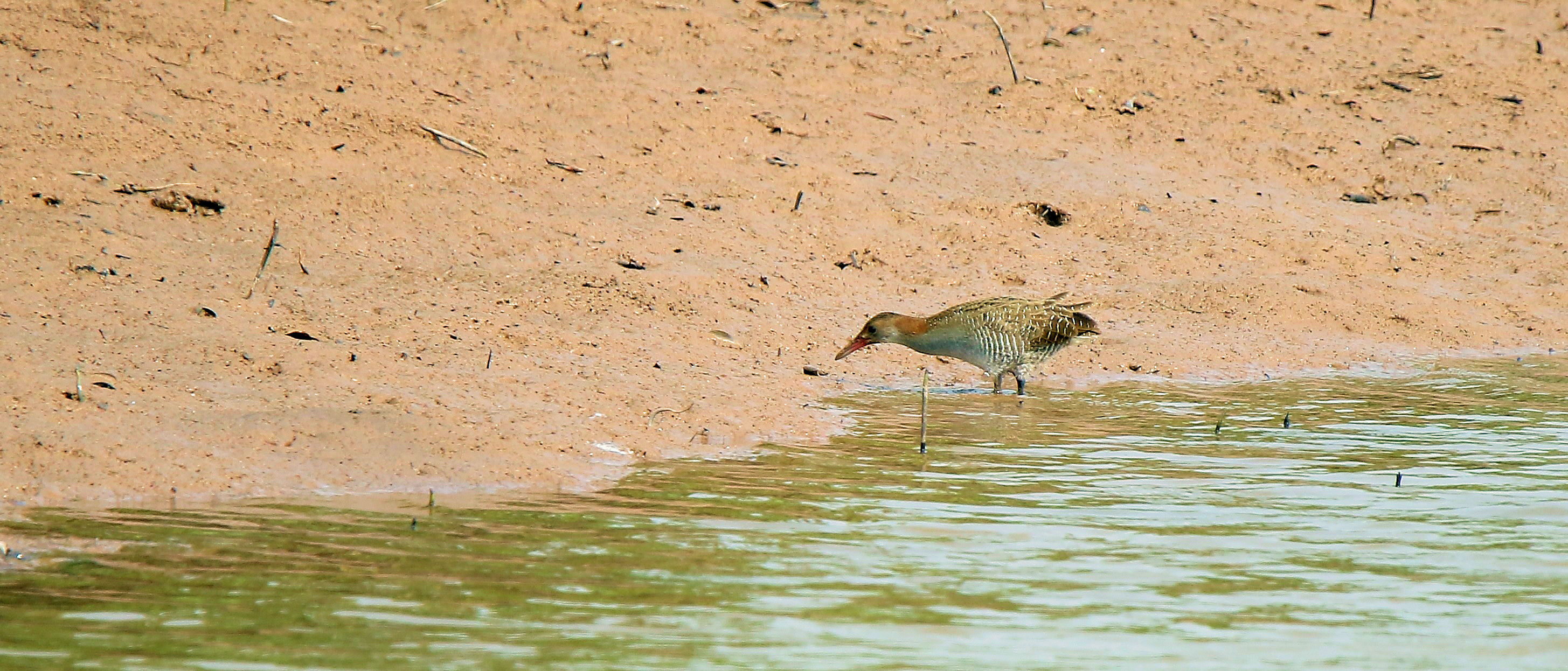 Gà nước vằn chụp tại Vườn quốc gia Xuân Thủy